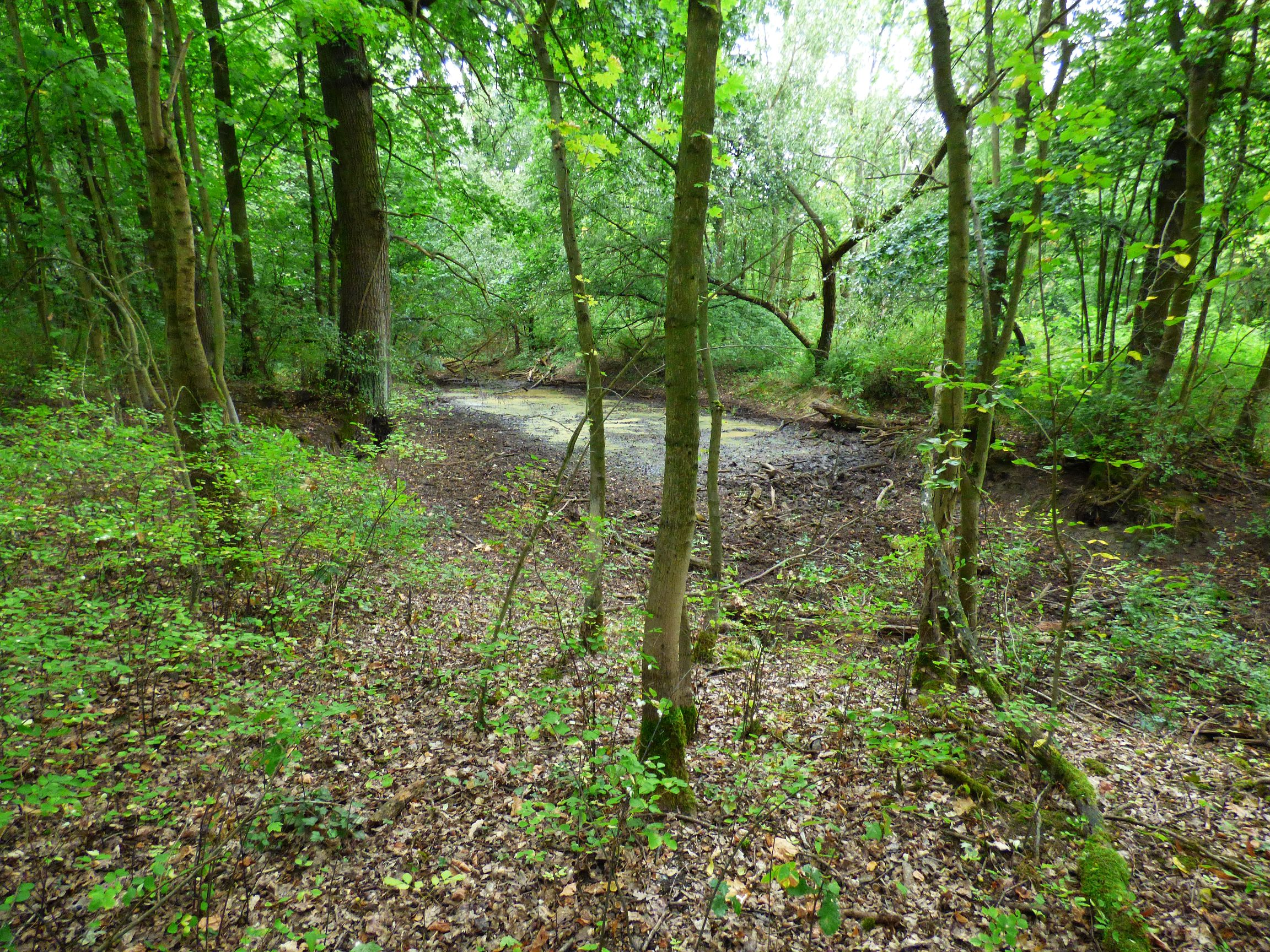 Lönnewitzer Landlache östlich der Alt Lönnewitzer Kirchenruine